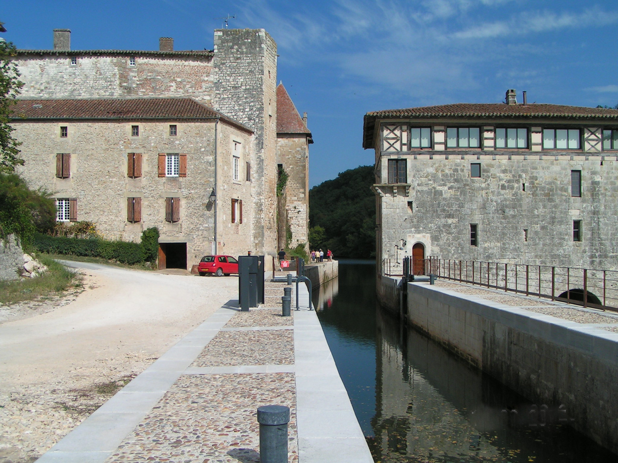 Écluse de Lustrac dans le Lot-et-Garonne, château et moulin de Lustrac (France).